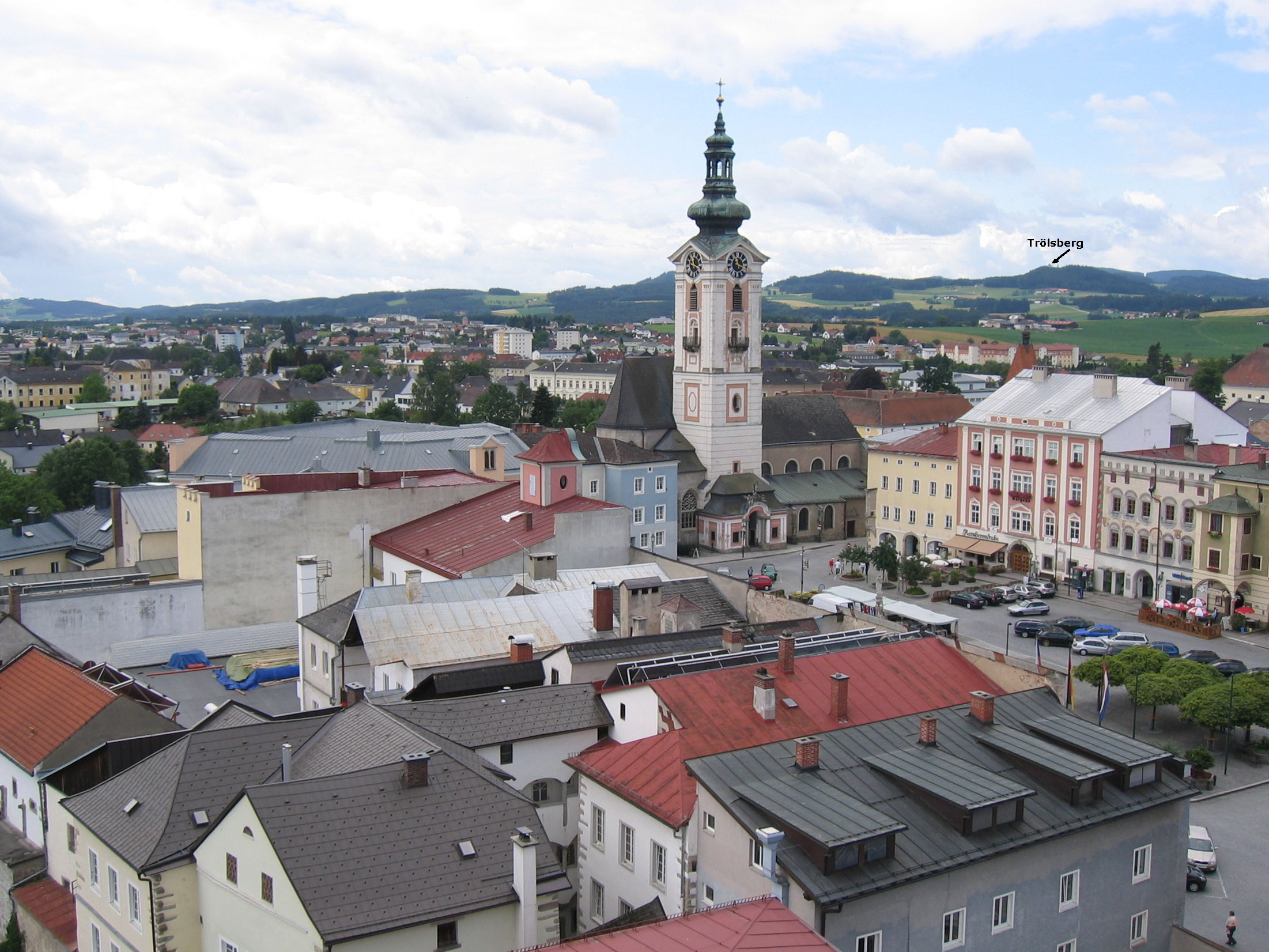 Ausblick vom Bergfried in Richtung Süden (Linz)